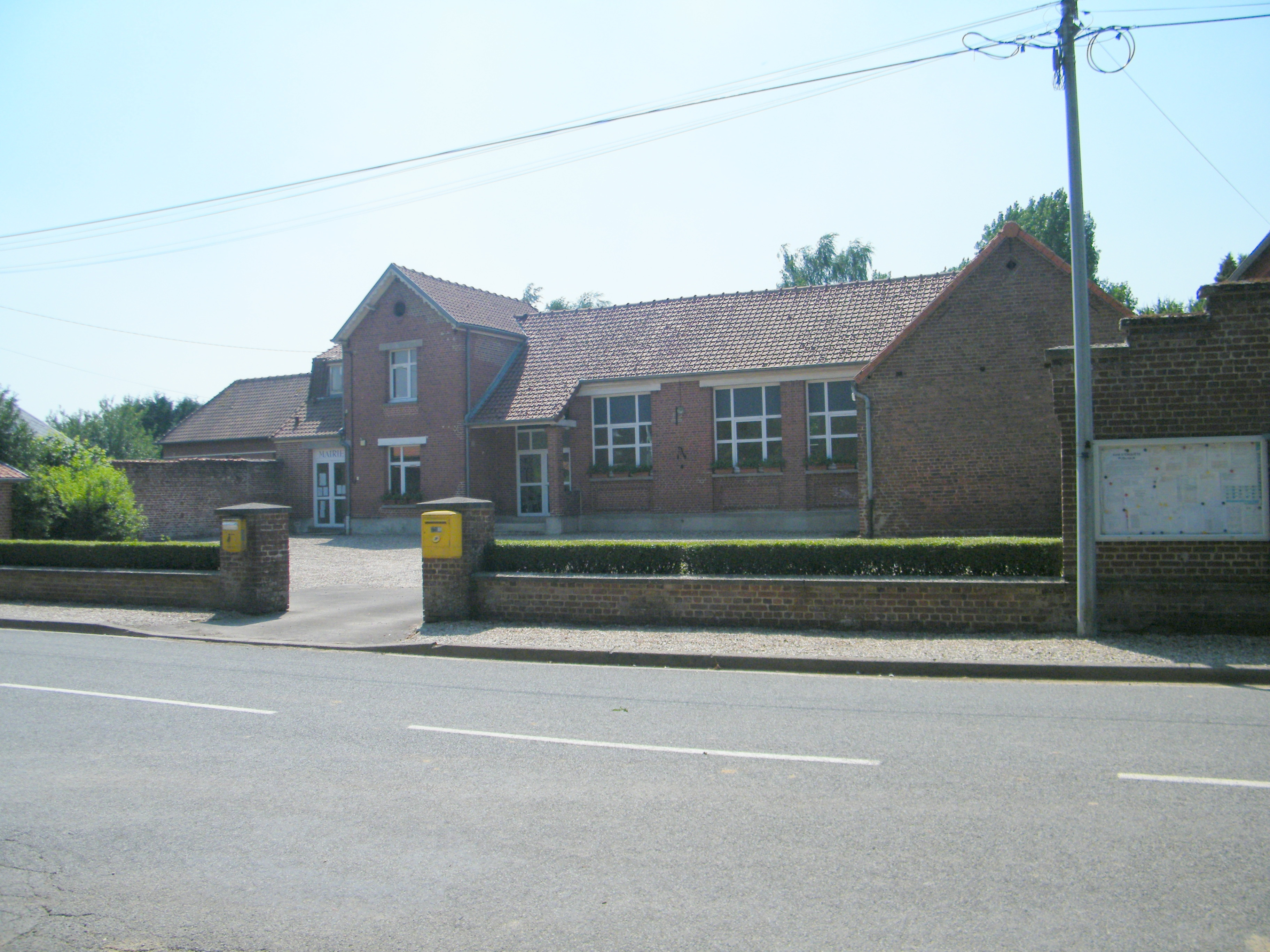 Mairie.